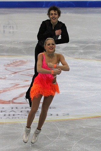 Схари Кох и Кристиан Нюхтерн (Германия) на чемпионате мира по фигурному катанию среди юниоров 2012